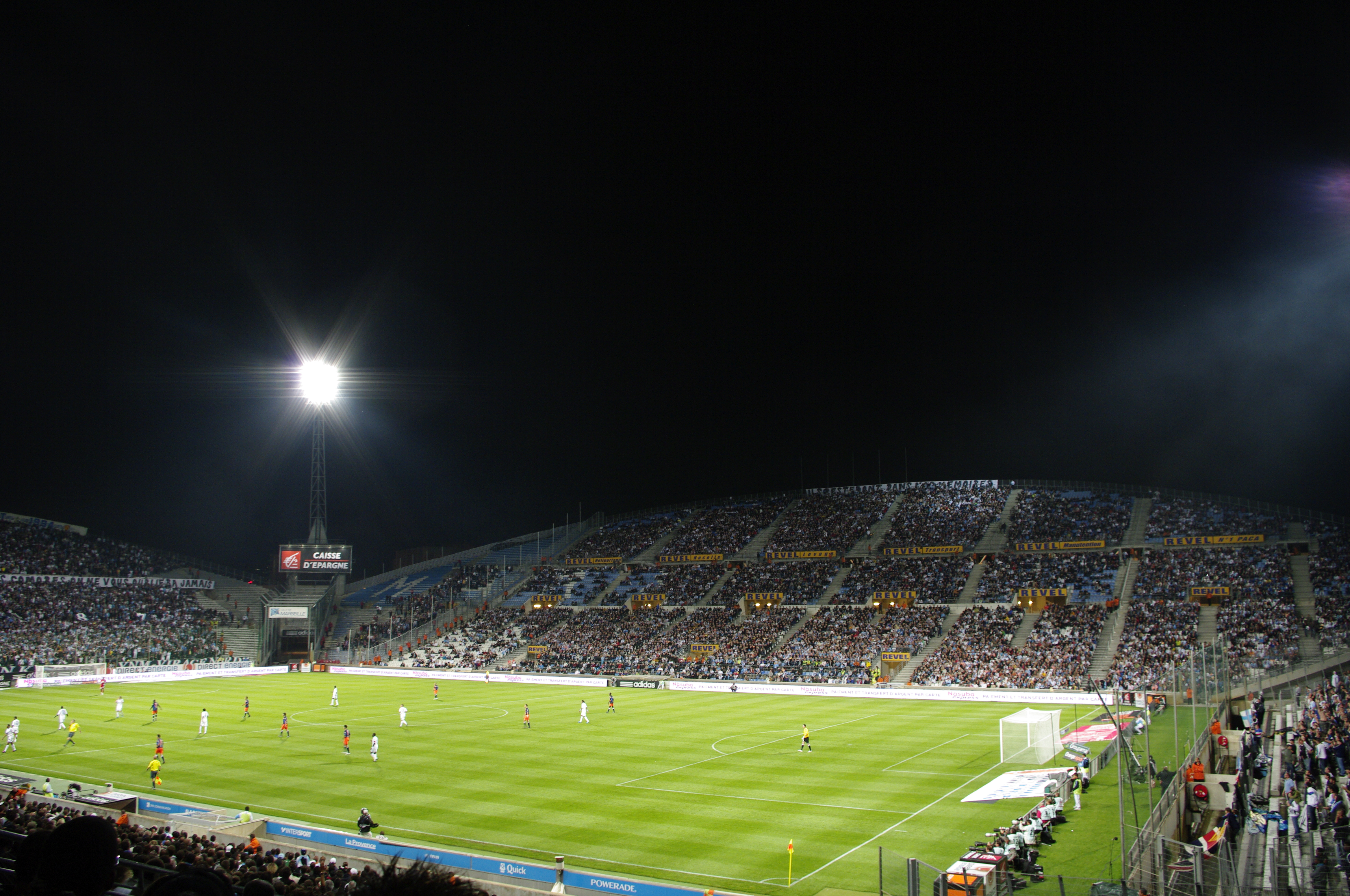 Match du Championnat de France de football 2009-2010 Olympique de Marseille (blanc) Montpellier HSC (bleu et orange) au Stade Vélodrome